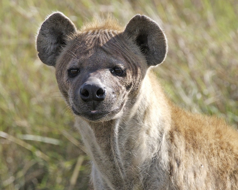 hyena 690V1212.jpg